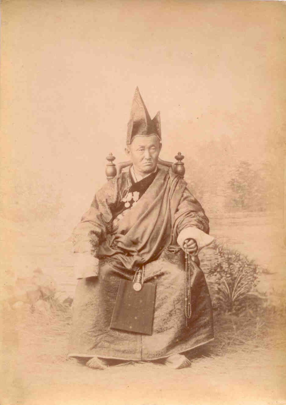 Lama bouddhiste sibérien